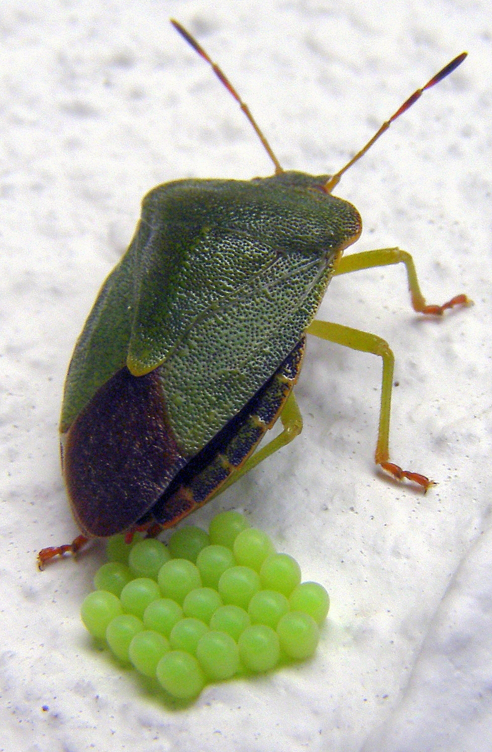 Palomena Prasina bei der Eiablage